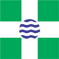 Türi valla lipp (1995–2005)